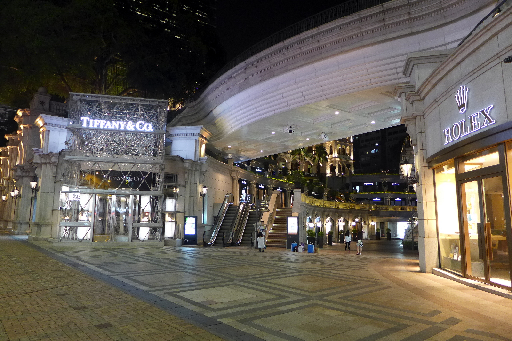 1881 Heritage Night view